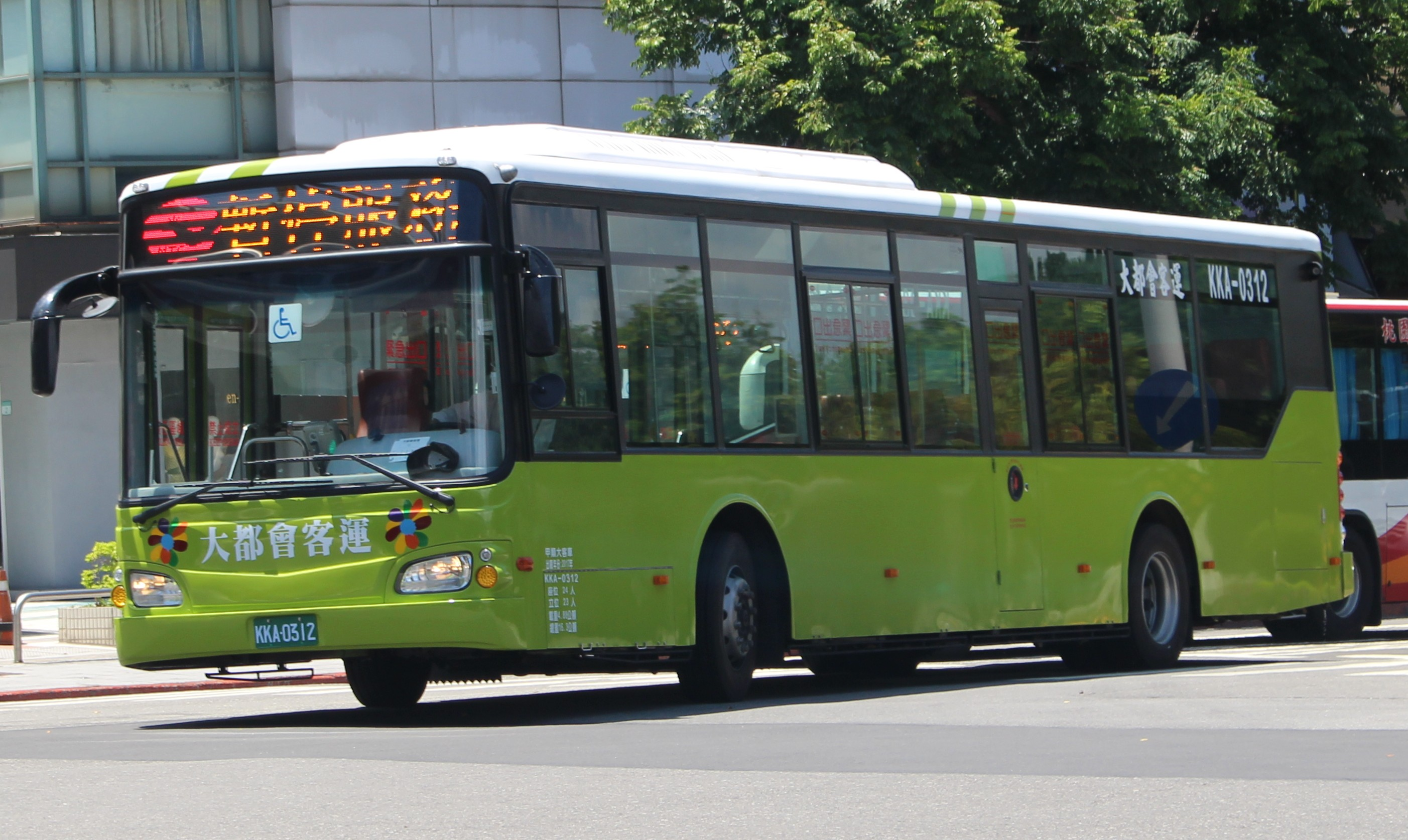 大都會客運2017 HINO HS8JRVL-UTF 固亞車體 KKA-0312